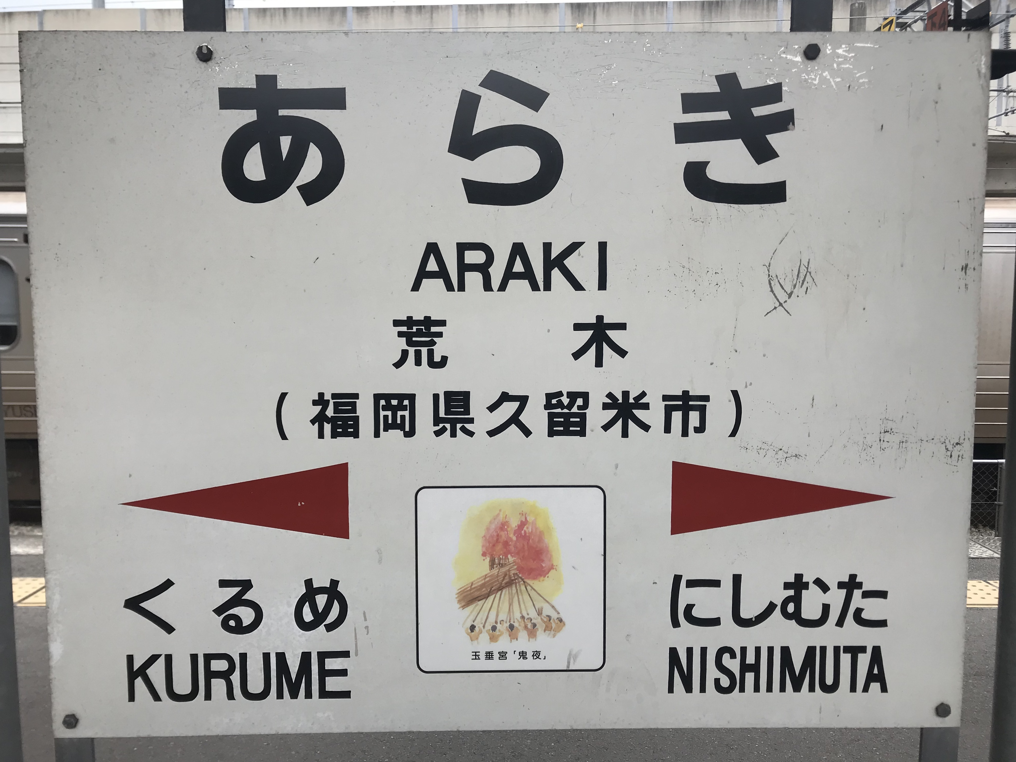 荒木駅の駅名標。イラストは大善寺玉垂宮の「鬼夜」